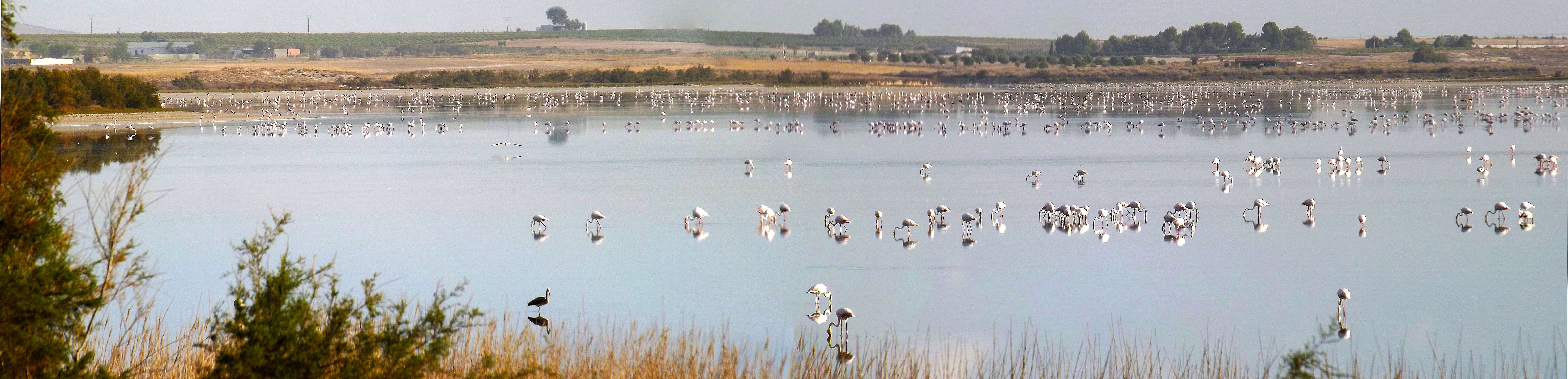 Panorámica de la Laguna Larga de Villacañas (Toledo), se pueden apreciar los flamencos